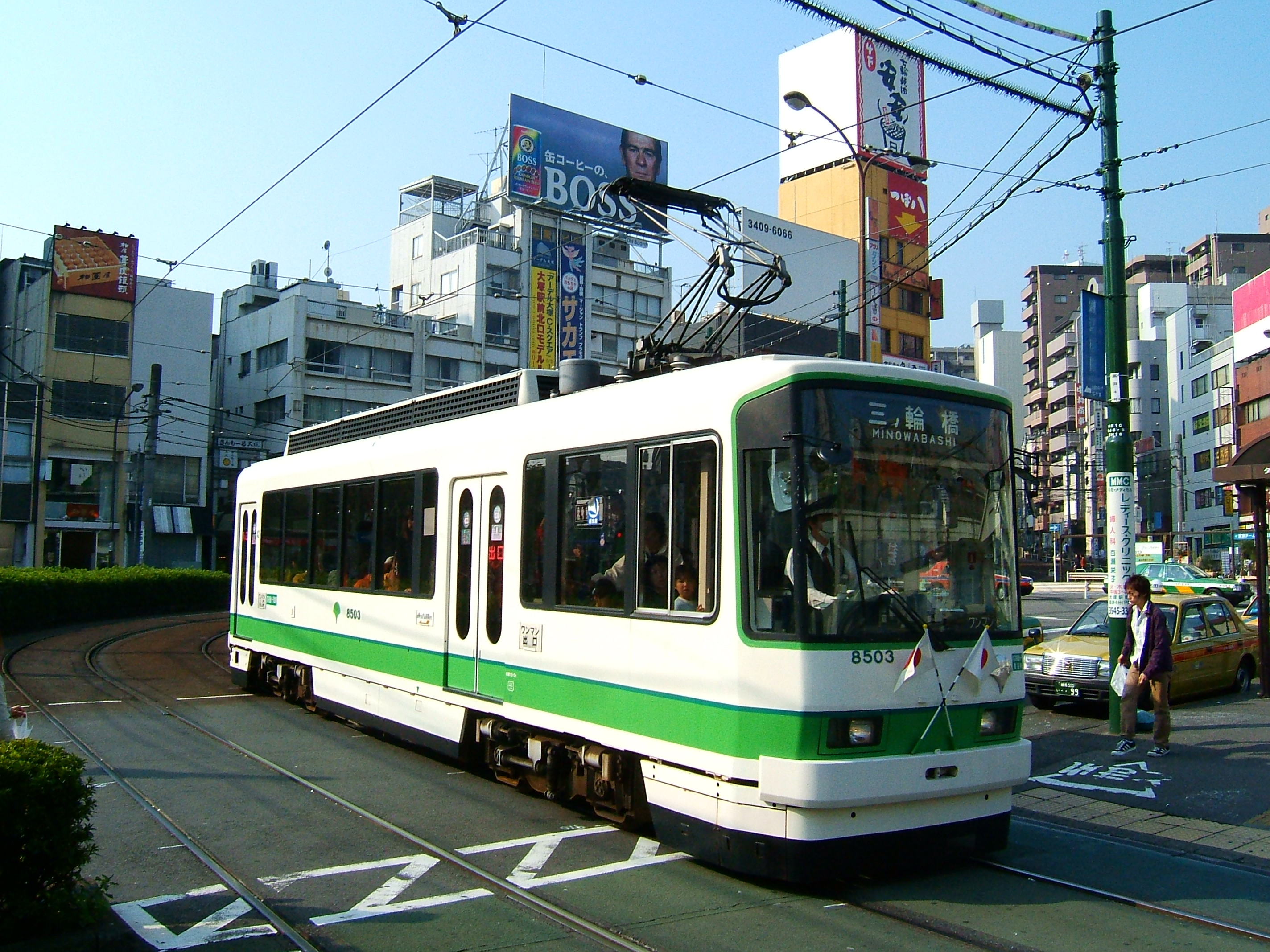 Arakawa tram at Otsuka